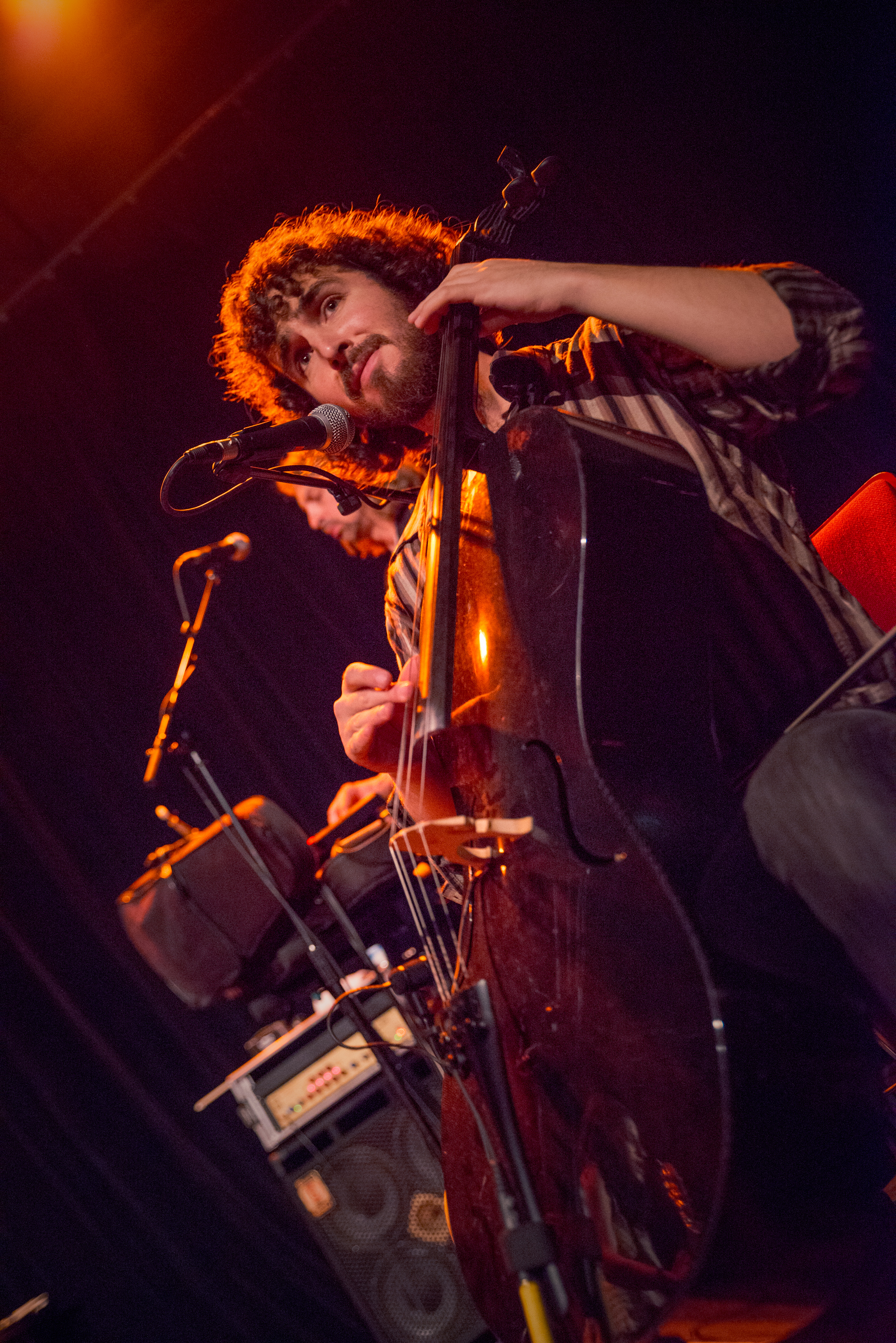 de